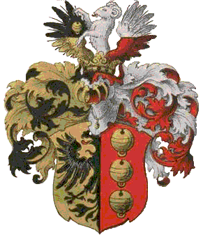 Schelkingi suguvõsa aadlivapp